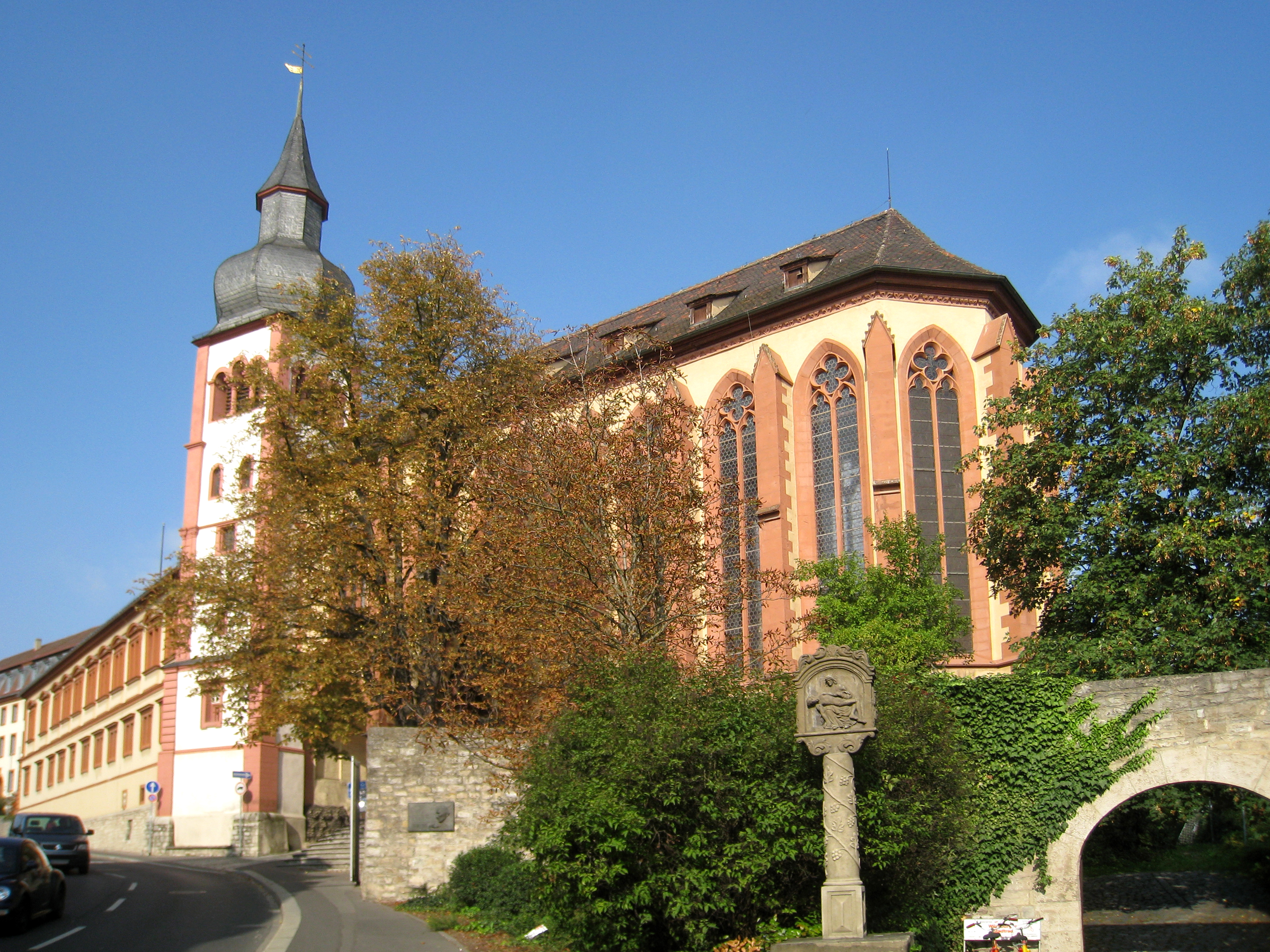 Deutschhaus Kirche Würzburg, Zeller Berg